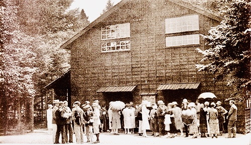 Karuizawa, Nagano, Japan, 1920s